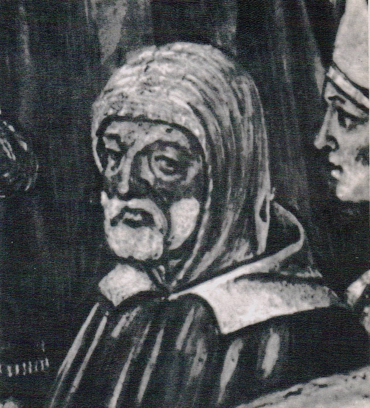 ציור דיוקנו של אליהו דלמדיגו